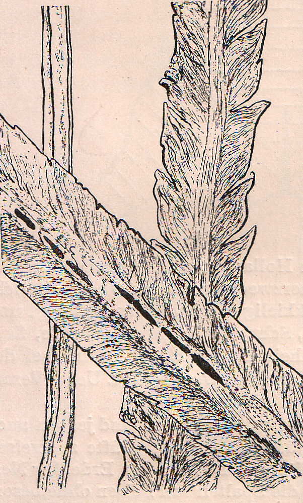 Faultierhaar (Folivora).